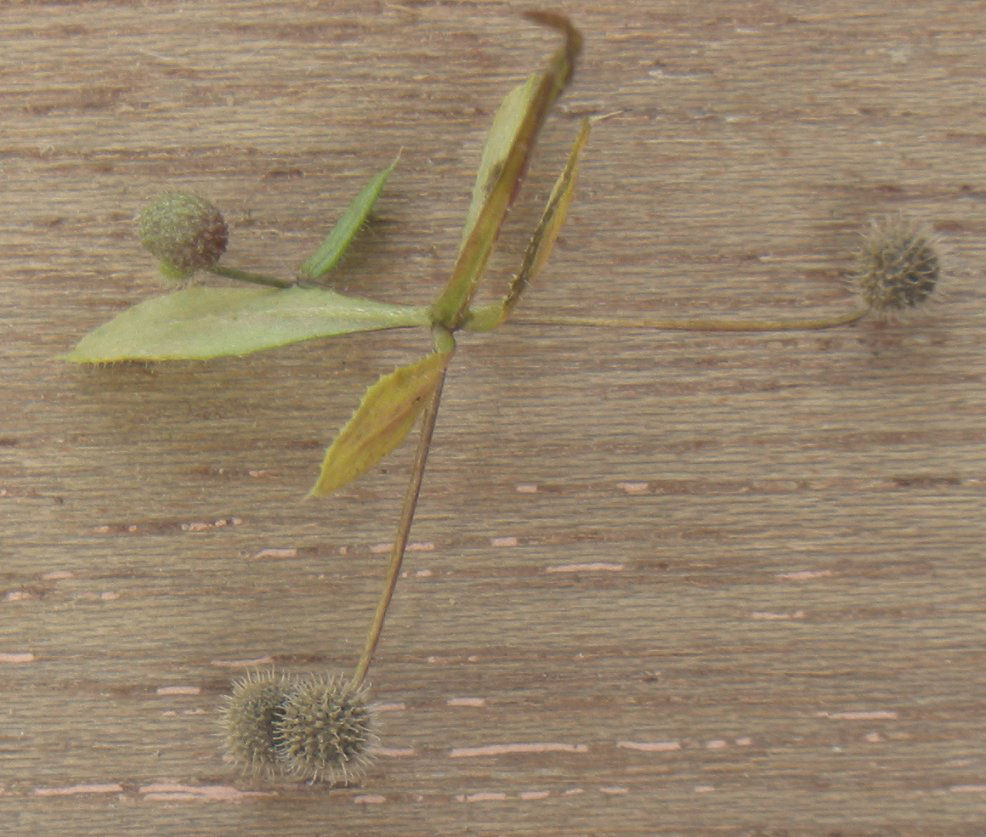 Galium aparine, zelfgemaakte foto van vruchten van Kleefkruid; begin september